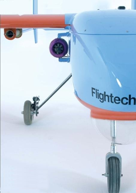 Visión frontal del avión FT-ALTEA